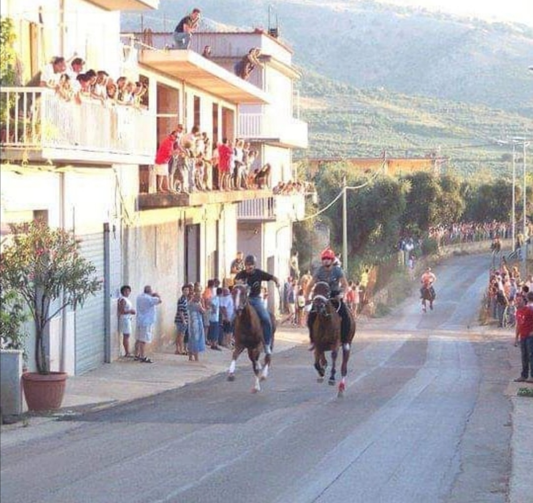 Palio di San Rocco 2